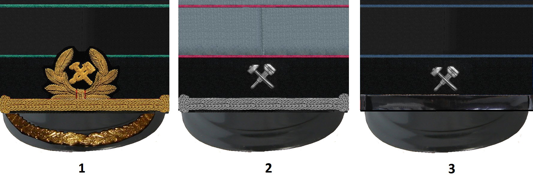 Фуражки МПС56